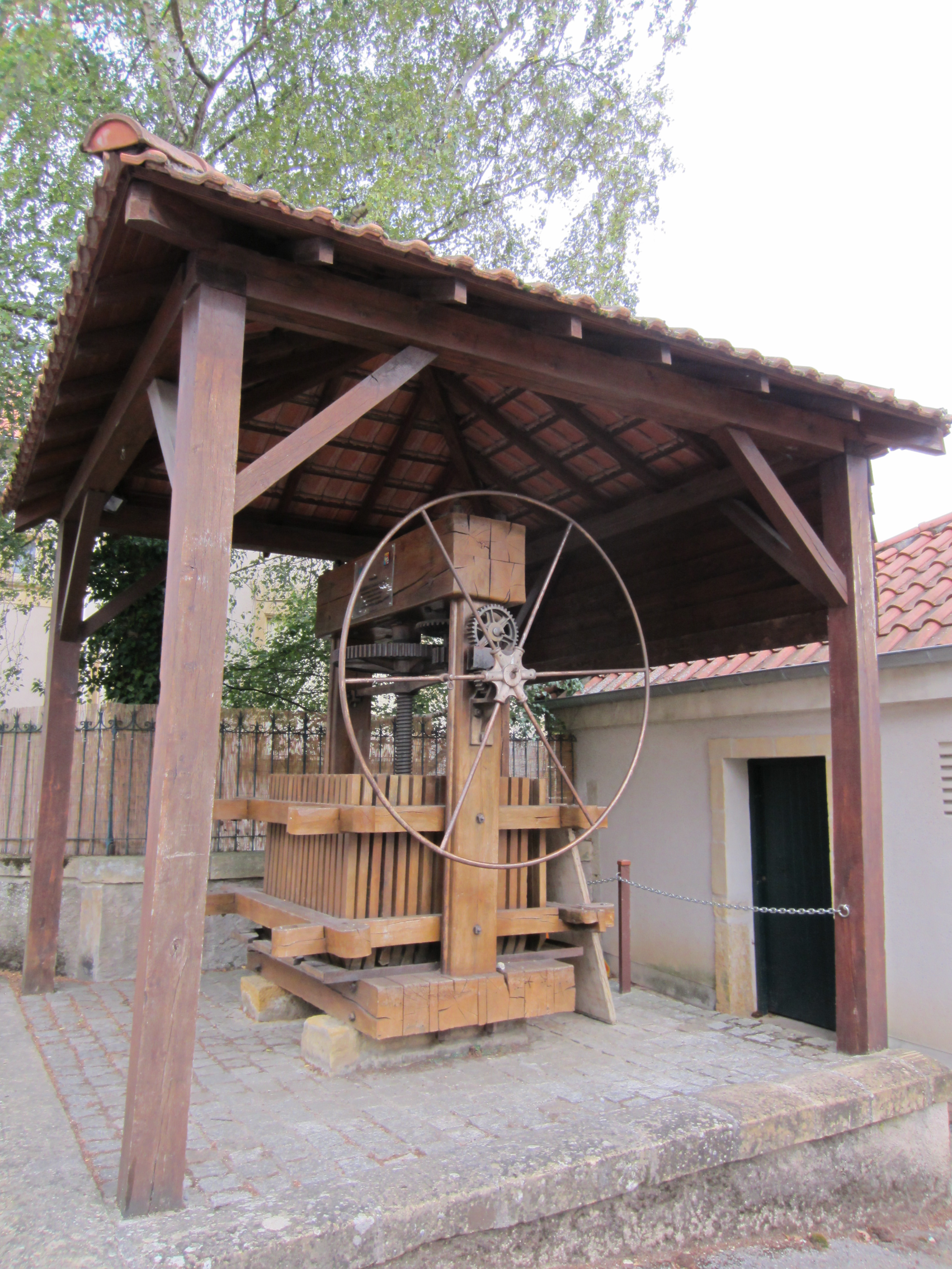 Description pressoir Sainte Ruffine pressoir Sainte Ruffine